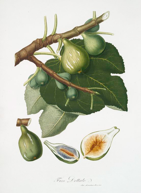 Fico Dottato (Ficus Carica sativa) Aquatints – Hand-colored from « Pomona Italiana » : Trattato degli alberi fruttiferi conteneate la Descrizione delle megliori varietáa dei Frutte coltivati in Italia, accompagnato da Figure disegnate, e colorite sul vero - Giorgio Gallesio.